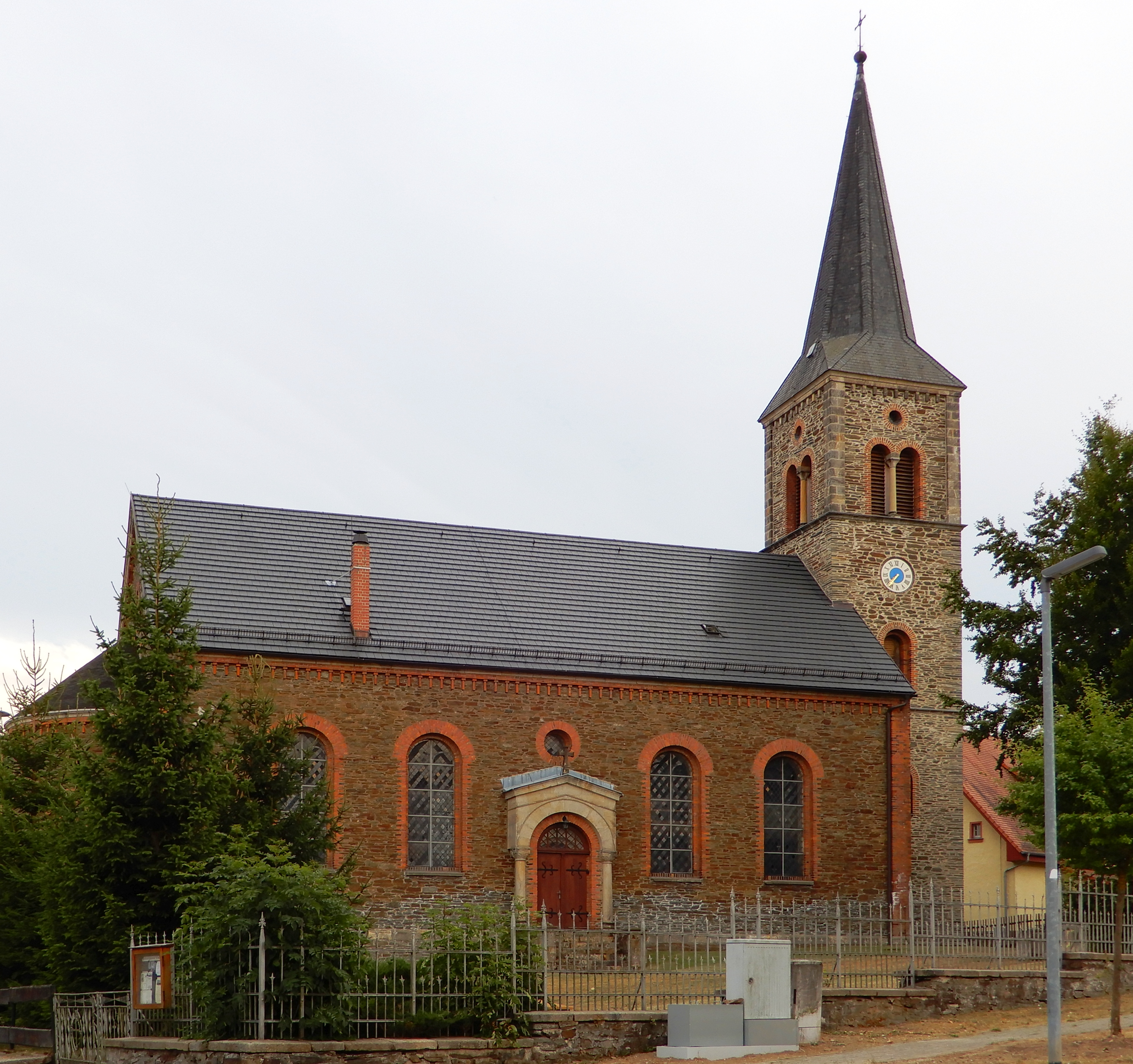 Kirche St. Martini